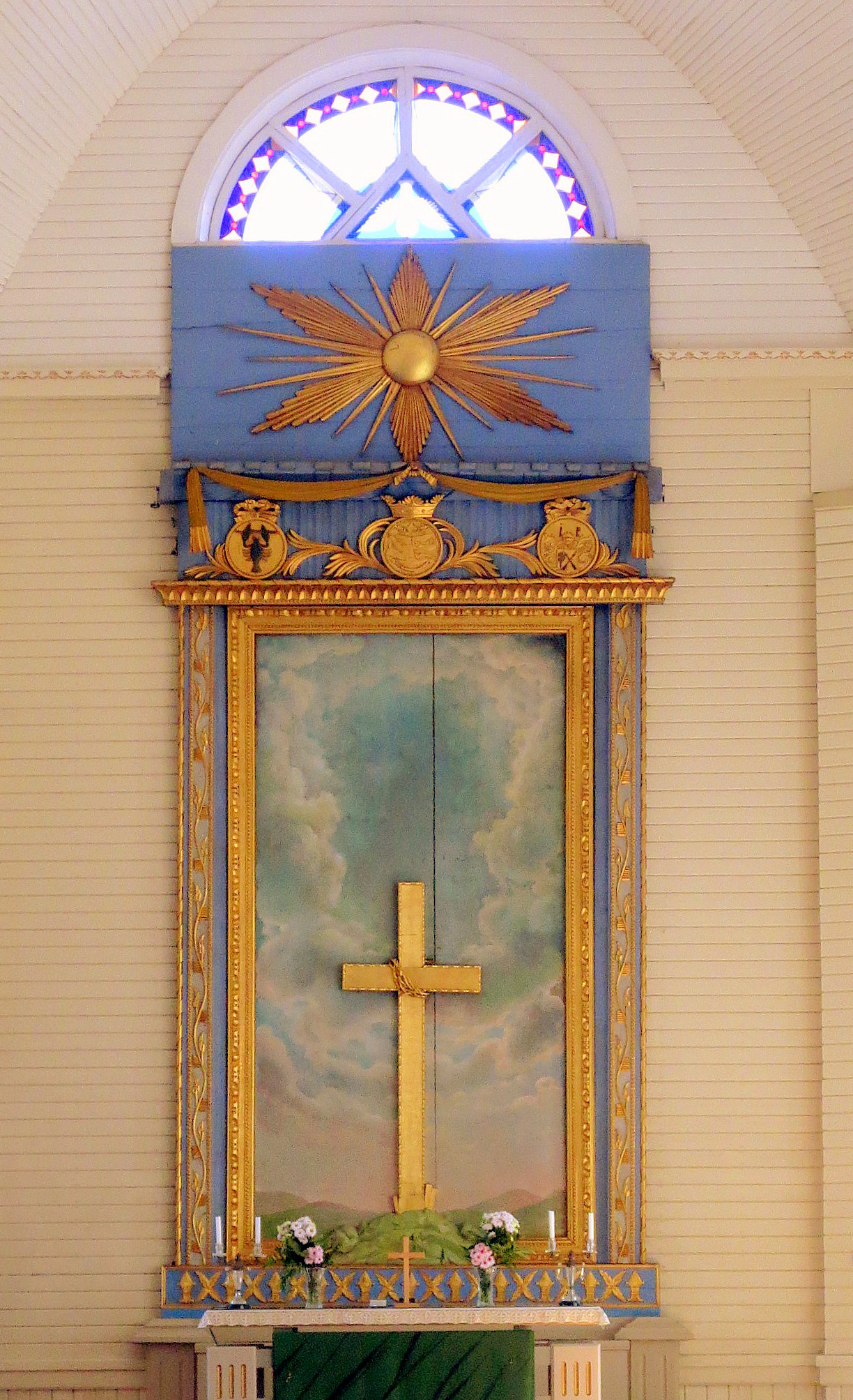 Eurajoen kirkko, alttaritaulu, Pyhän Hengen kyyhkynen, Ilmari Launis, Eurajoki Original photo is: Eurajoen kirkon alttaritaulu